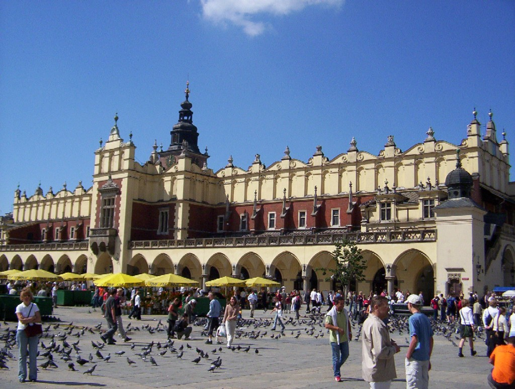 [pl] Kraków, Rynek Główny - Sukiennice [en] Cracow, Main Market Square - Sukiennice [fr] Cracovie, La place du marché - Sukiennice [de] Krakau, Marktplatz - Sukiennice Photo by Michal Ksiazek (michalk) 01.09.2004